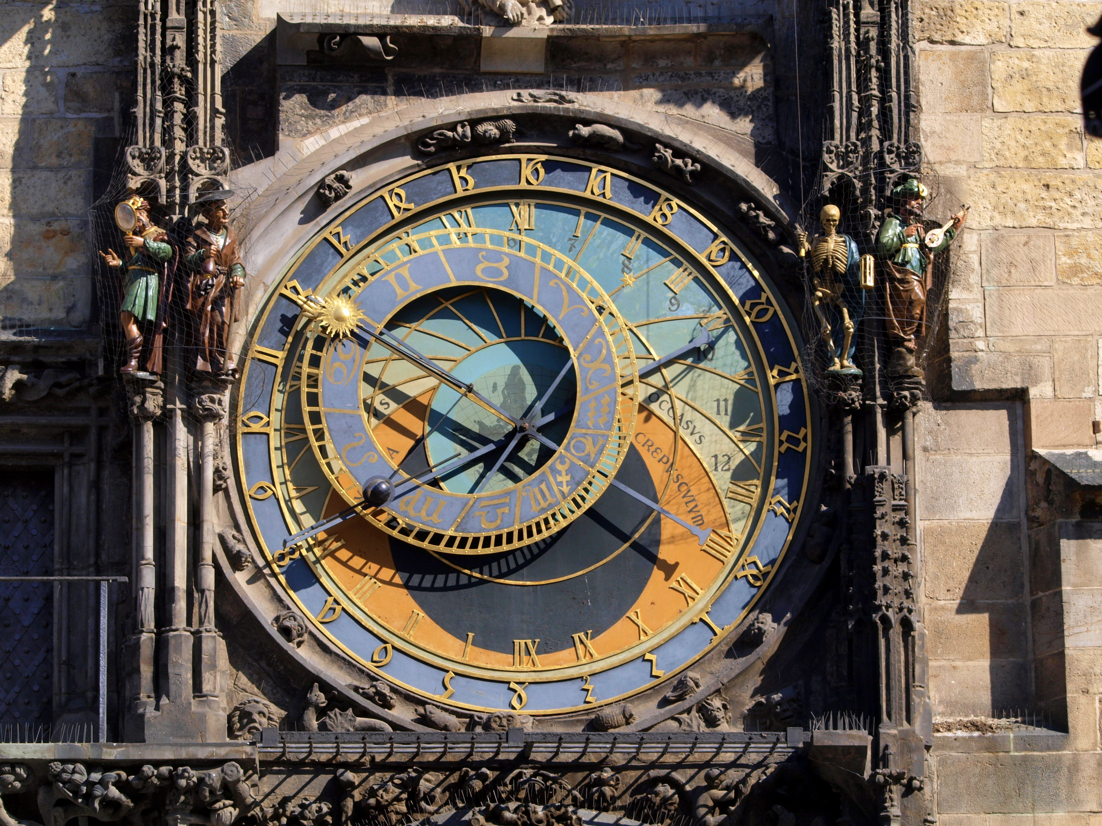 Prague Astronomical Clock, Prague Orloj